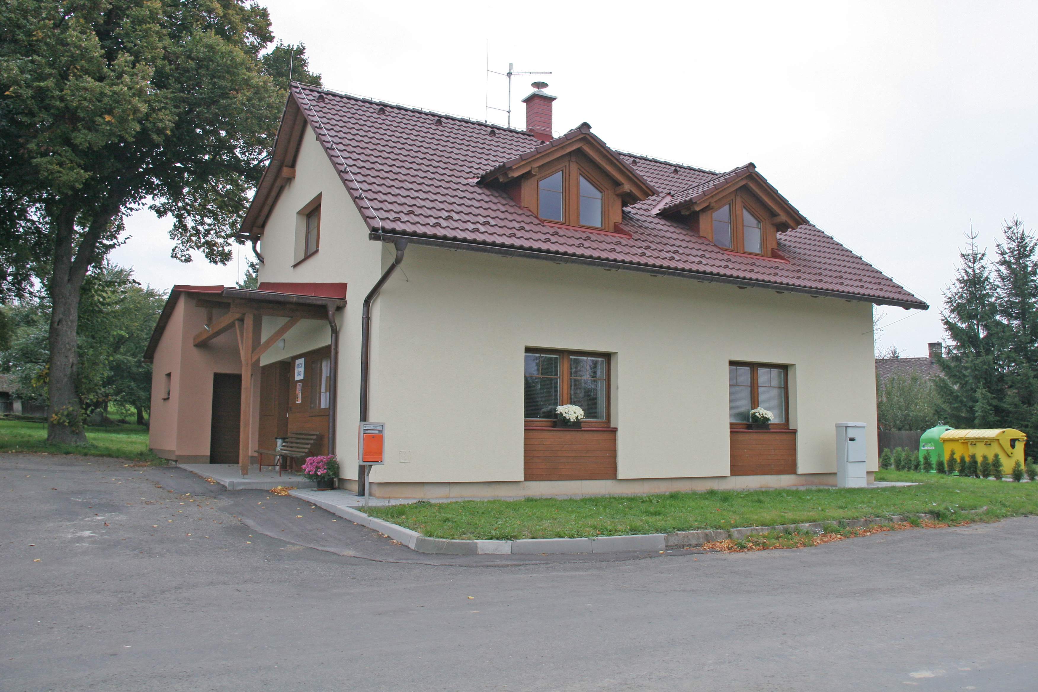 Borek čp. 8